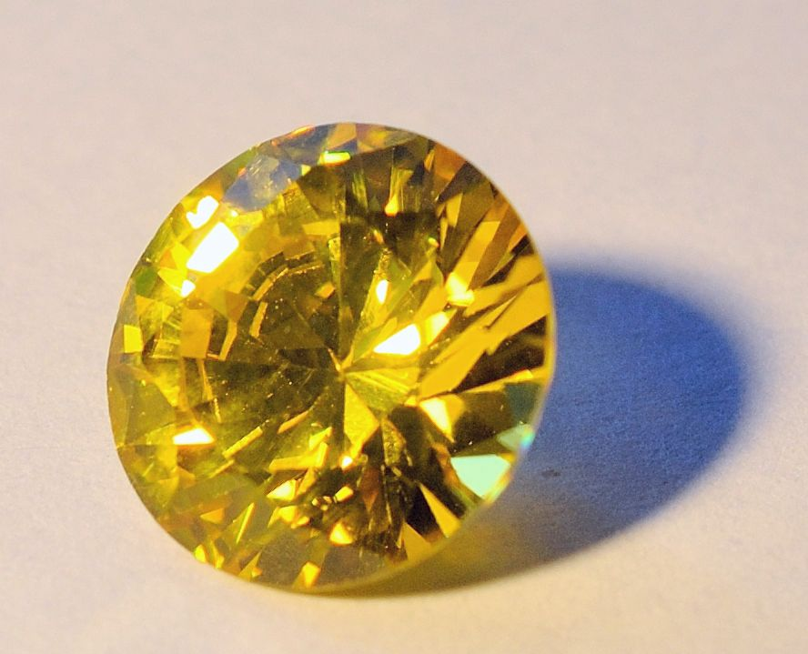 Zircone (Dioxyde de Zirconium) jaune. diamètre : 10mm